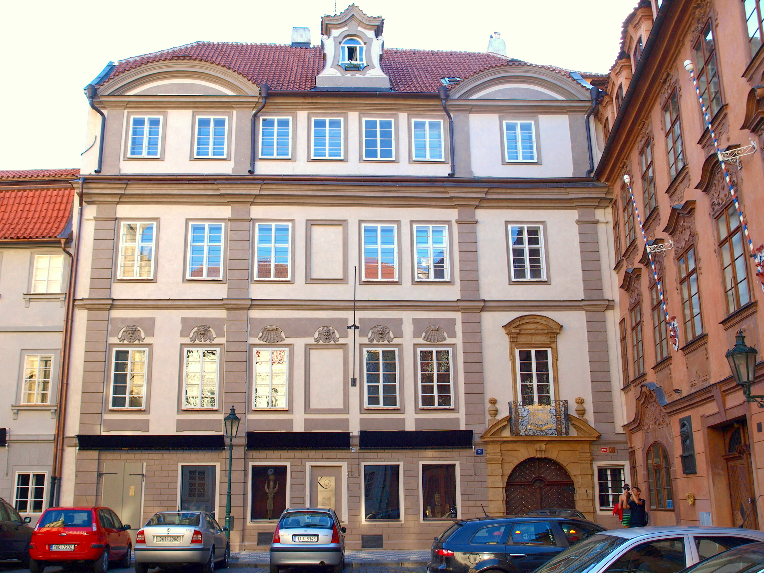 Sterneggovský palác